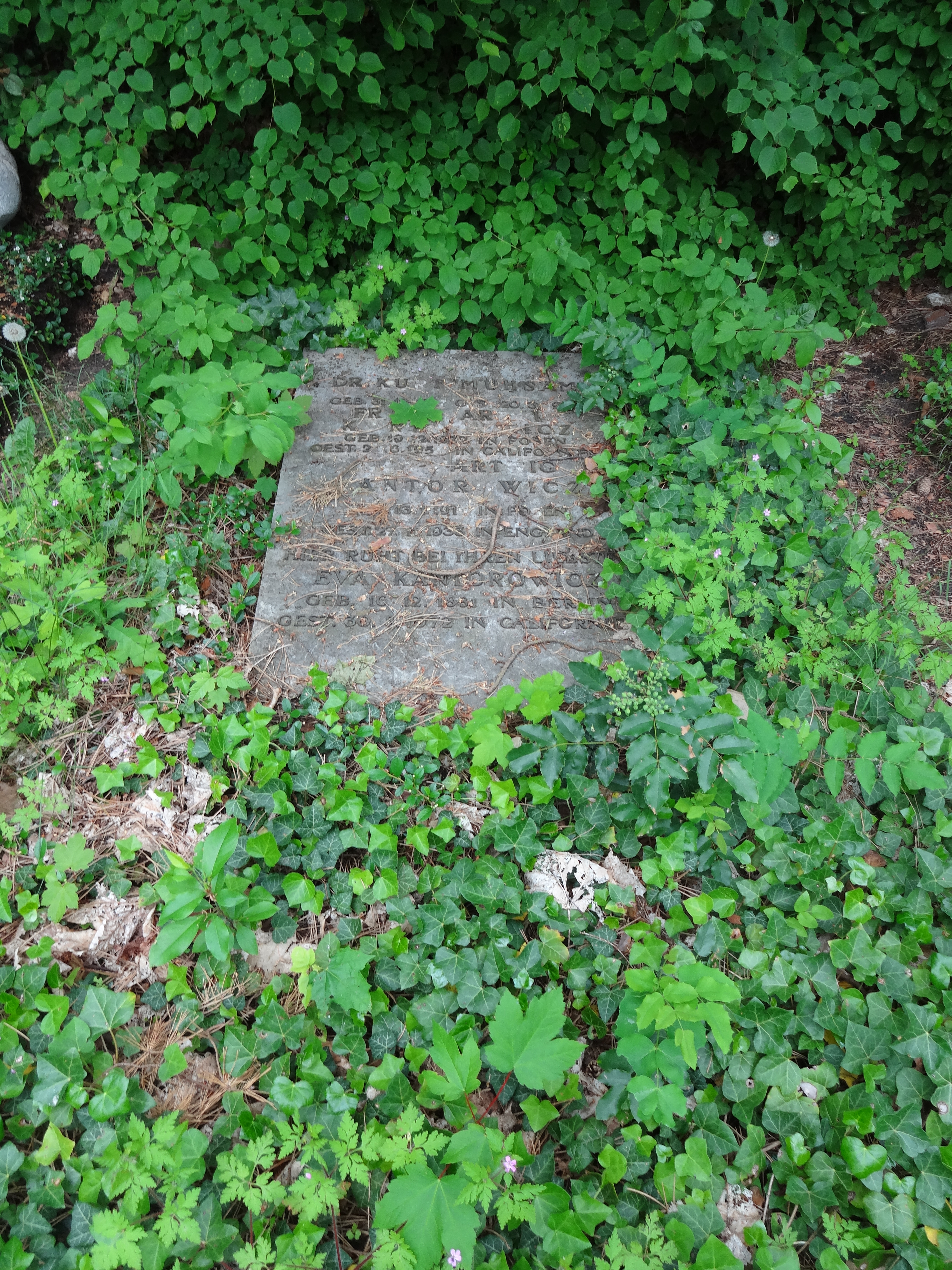 Grab von Kurt Mühsam auf dem Friedhof Heerstraße in Berlin